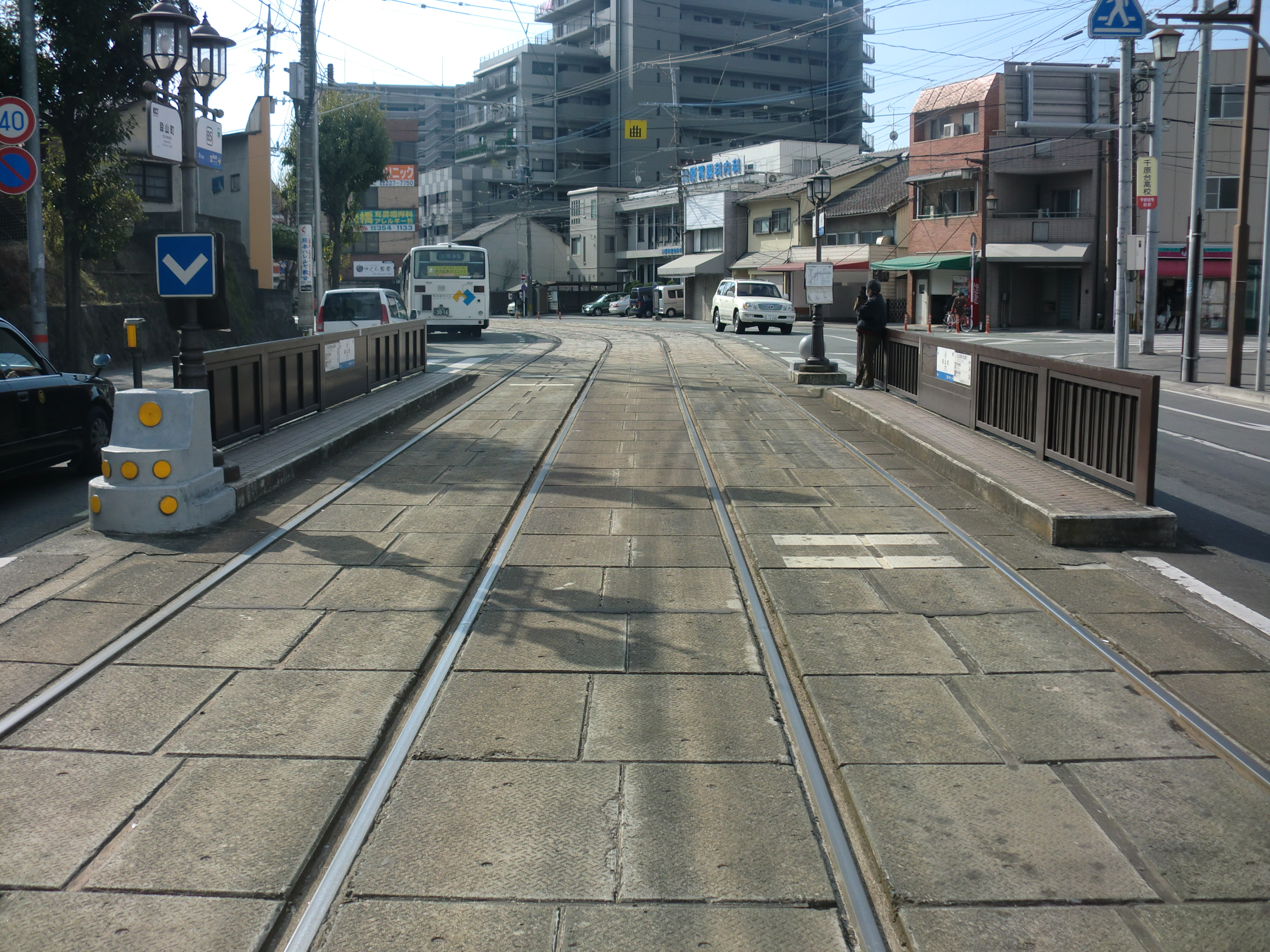 熊本市電段山町（だにやま）駅